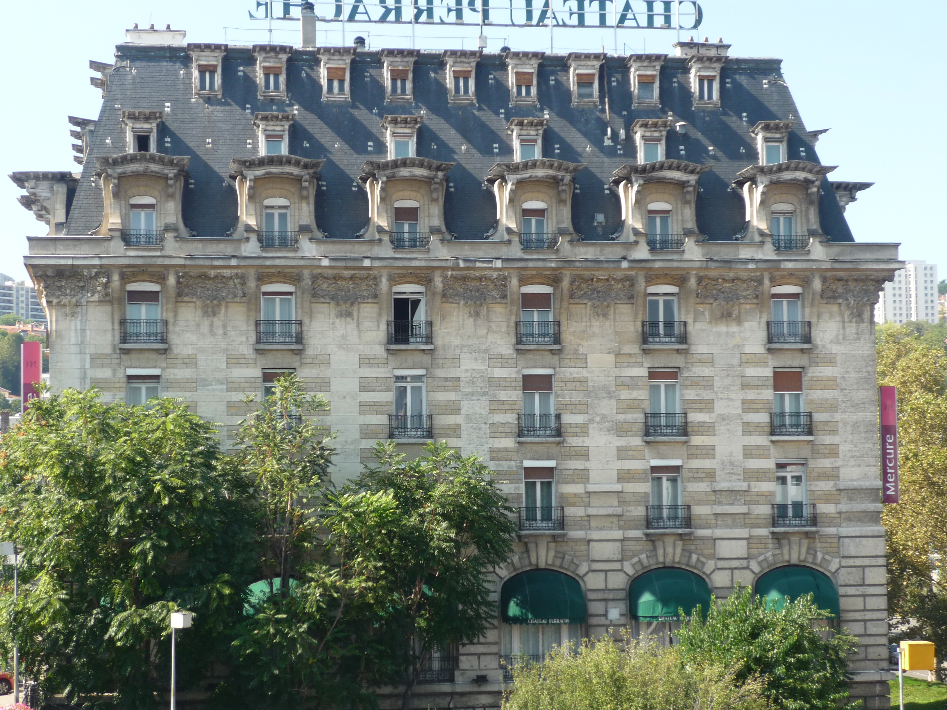 Ancien hôtel Terminus, actuel "Grand Hôtel Mercure Château Perrache". 1er quart 20e siècle (construction en 1905). 12 Cours Verdun Rambaud à Lyon, dans le 2e arrondissement .